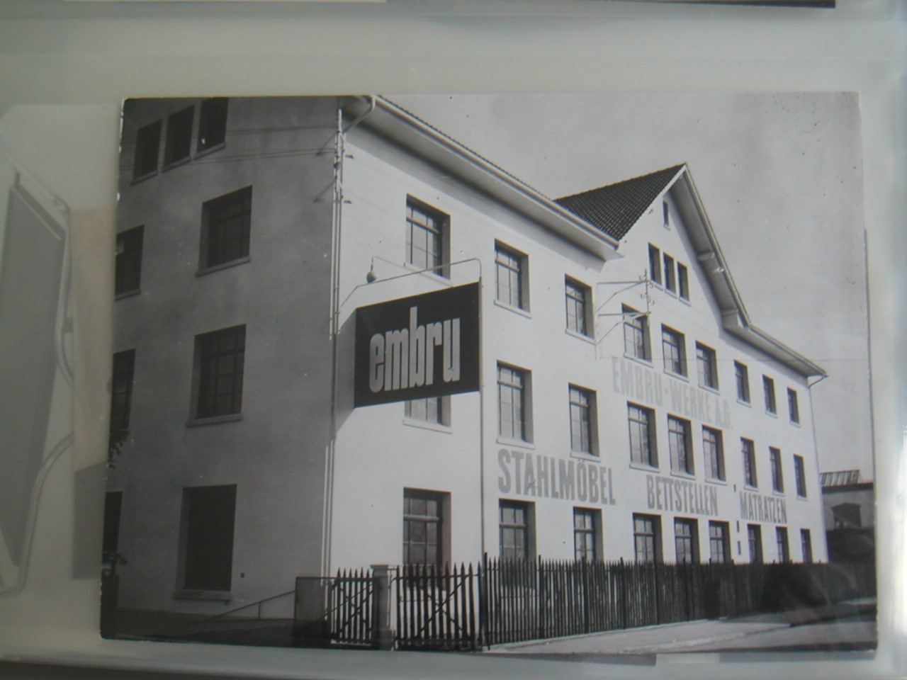 Ansicht der Embru Werke 1933